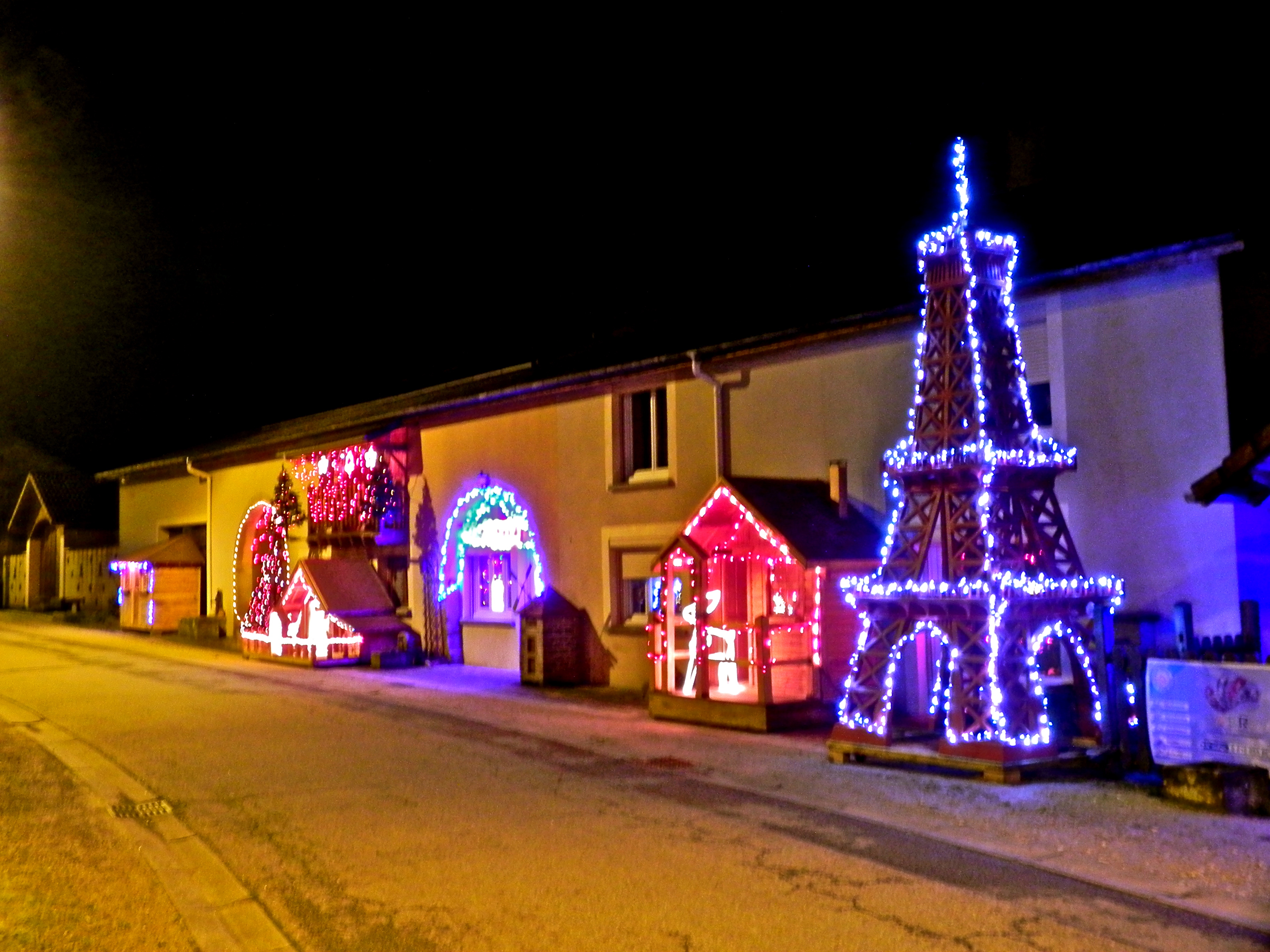 Les Vosges